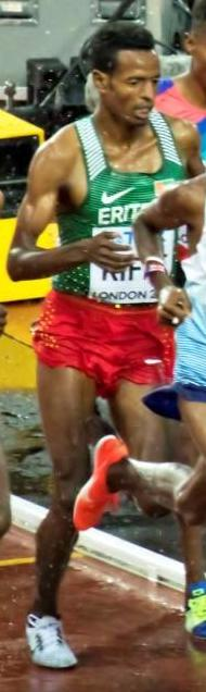 d5_5 5000m abdi farah